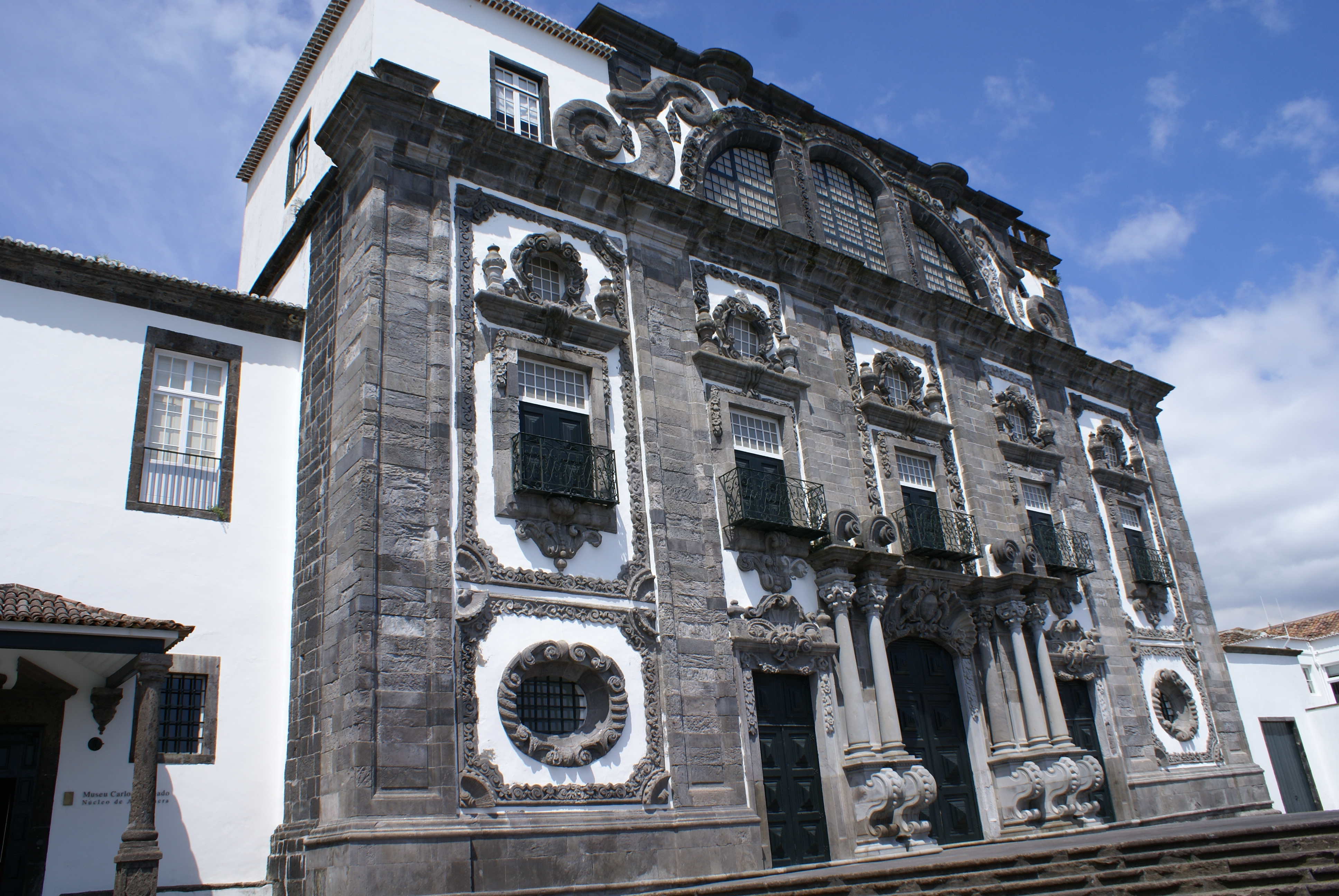 Church of the Colégio dos Jesuitas, São Sebastião, Ponta Delgada, São Miguel (Azores), Portugal